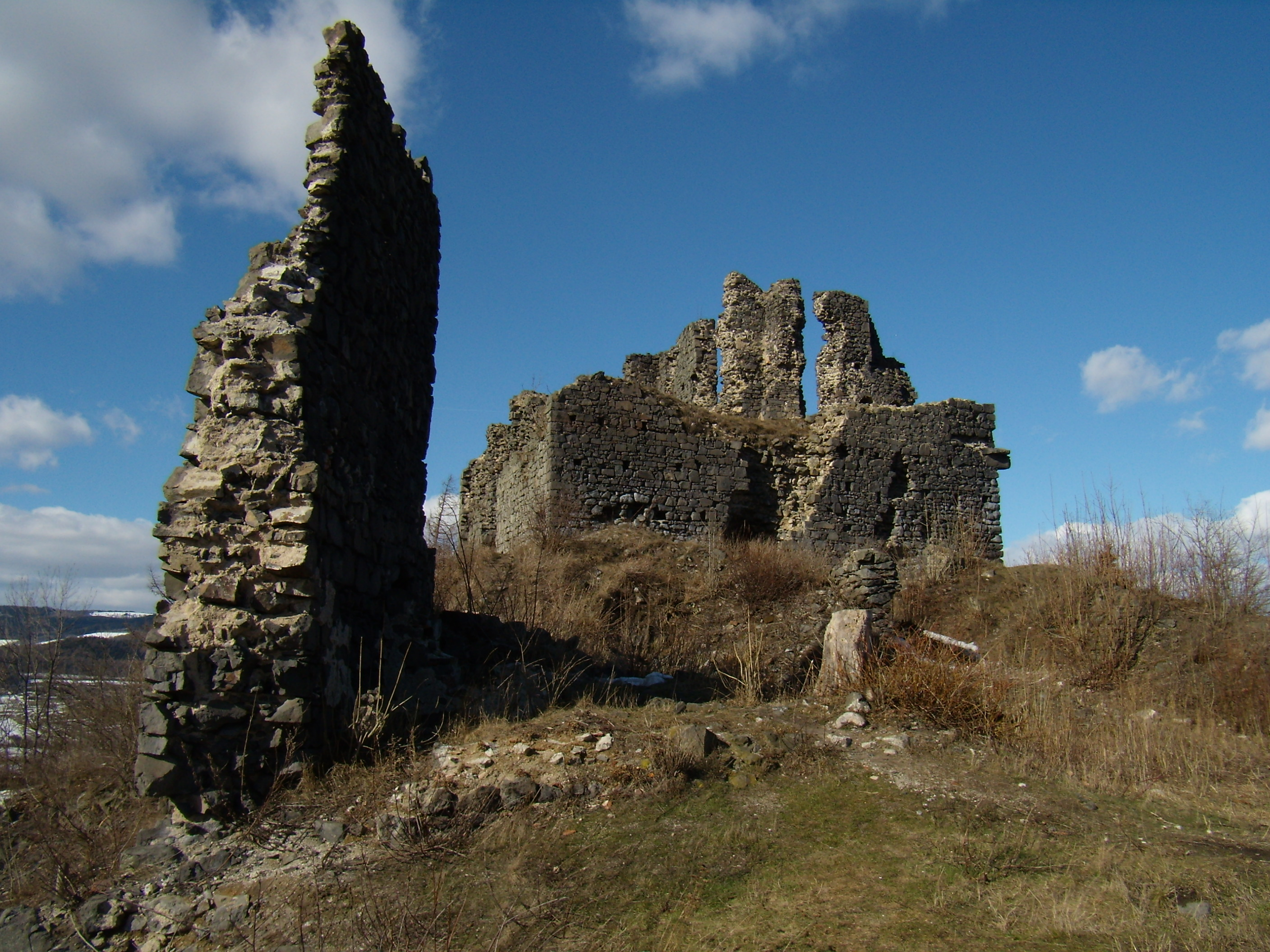 Šumburk